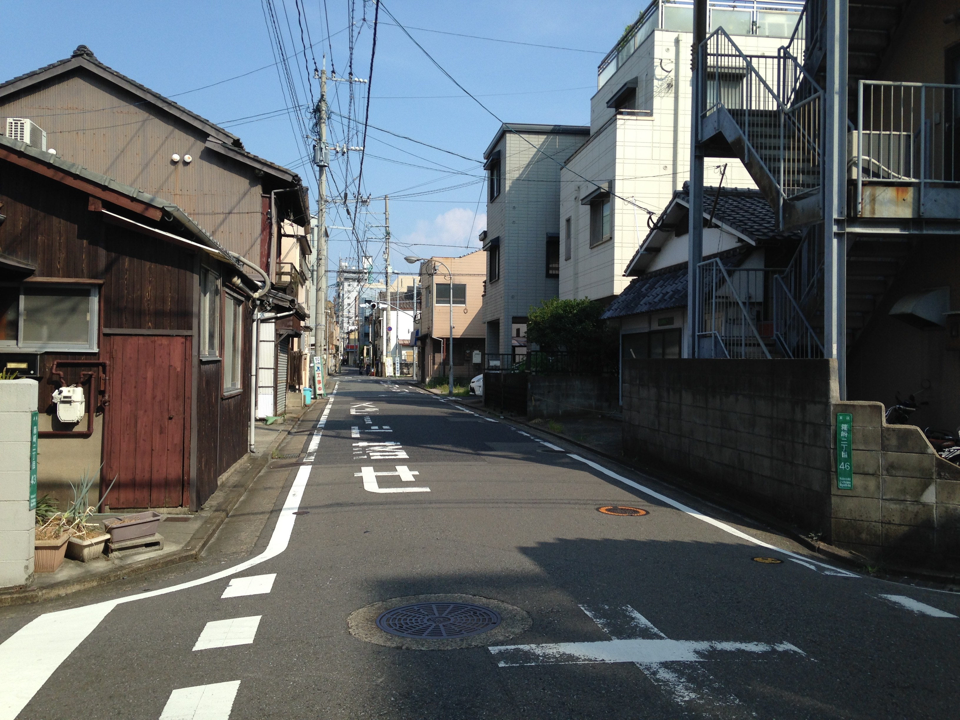 福岡市東区箱崎の福岡県道68号